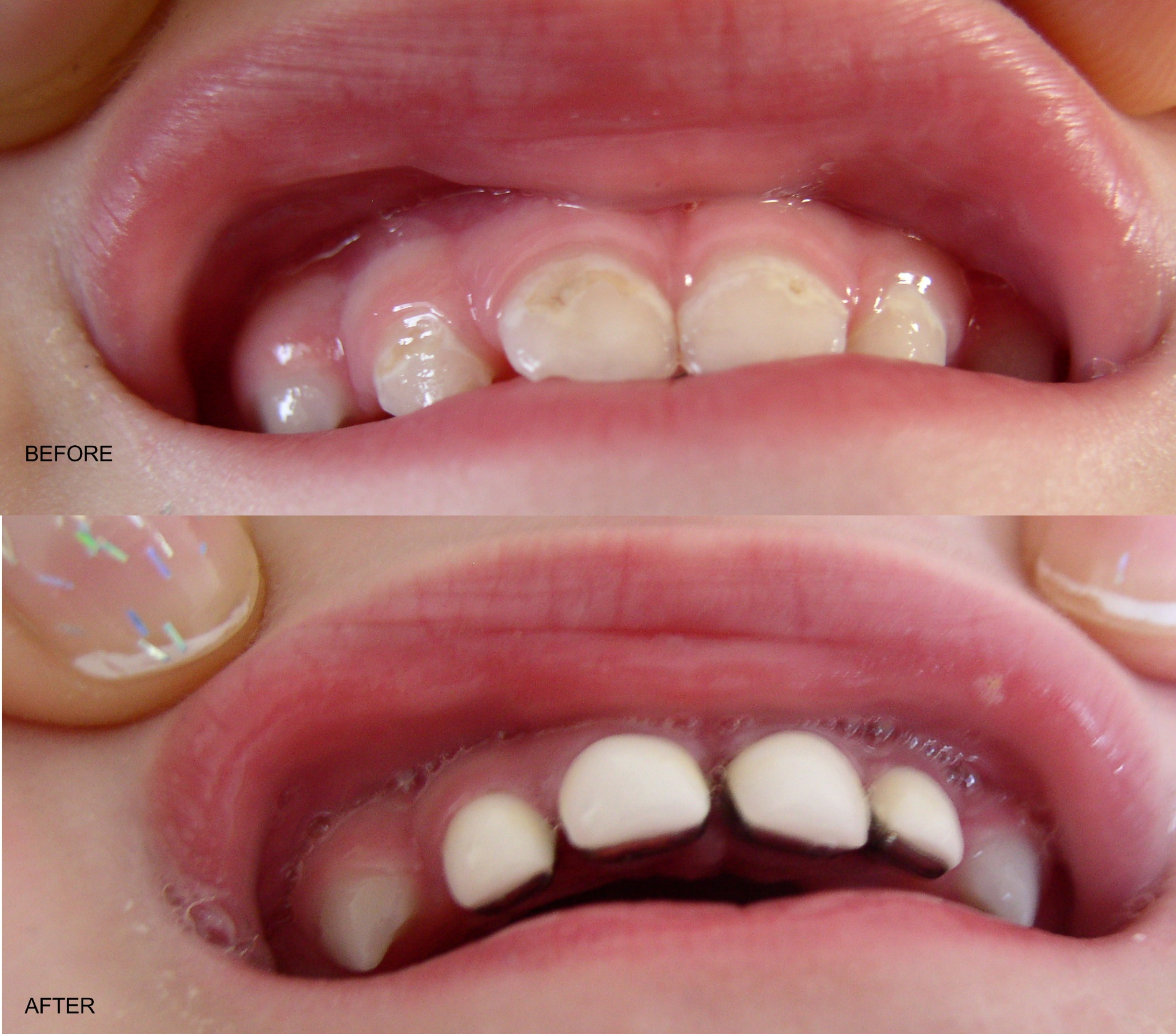 korony zebów mlecznych u 1,5 rocznego dziecka